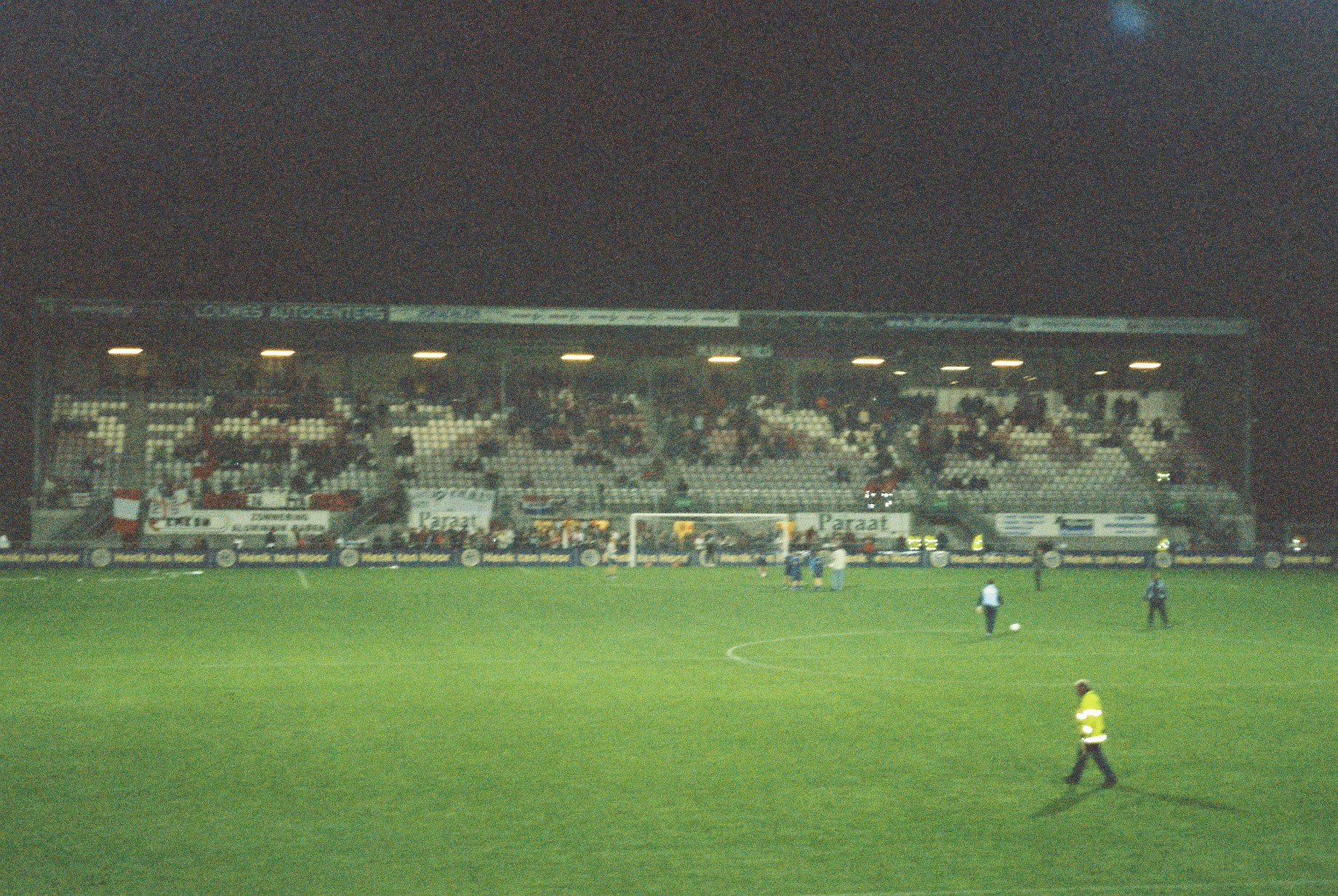 Univé Stadion in het Nederlandse Emmen.